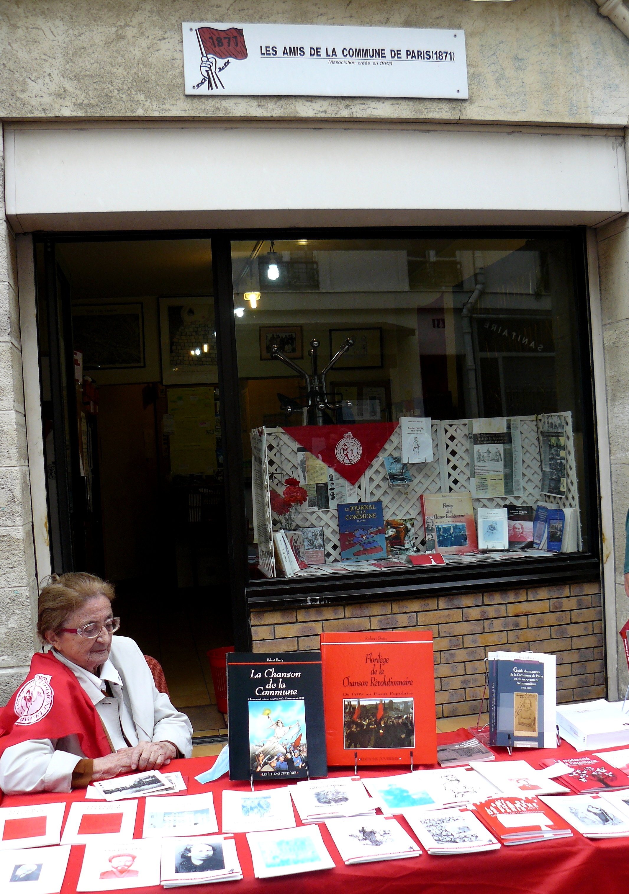 Le local-librairie de l'Association des Amis de la Commune de Paris (1871), Association créée en 1882 - 46 rue des Cinq-Diamants (Paris 13ème) lors d'un Vide-Grenier (la Butte aux Cailles).